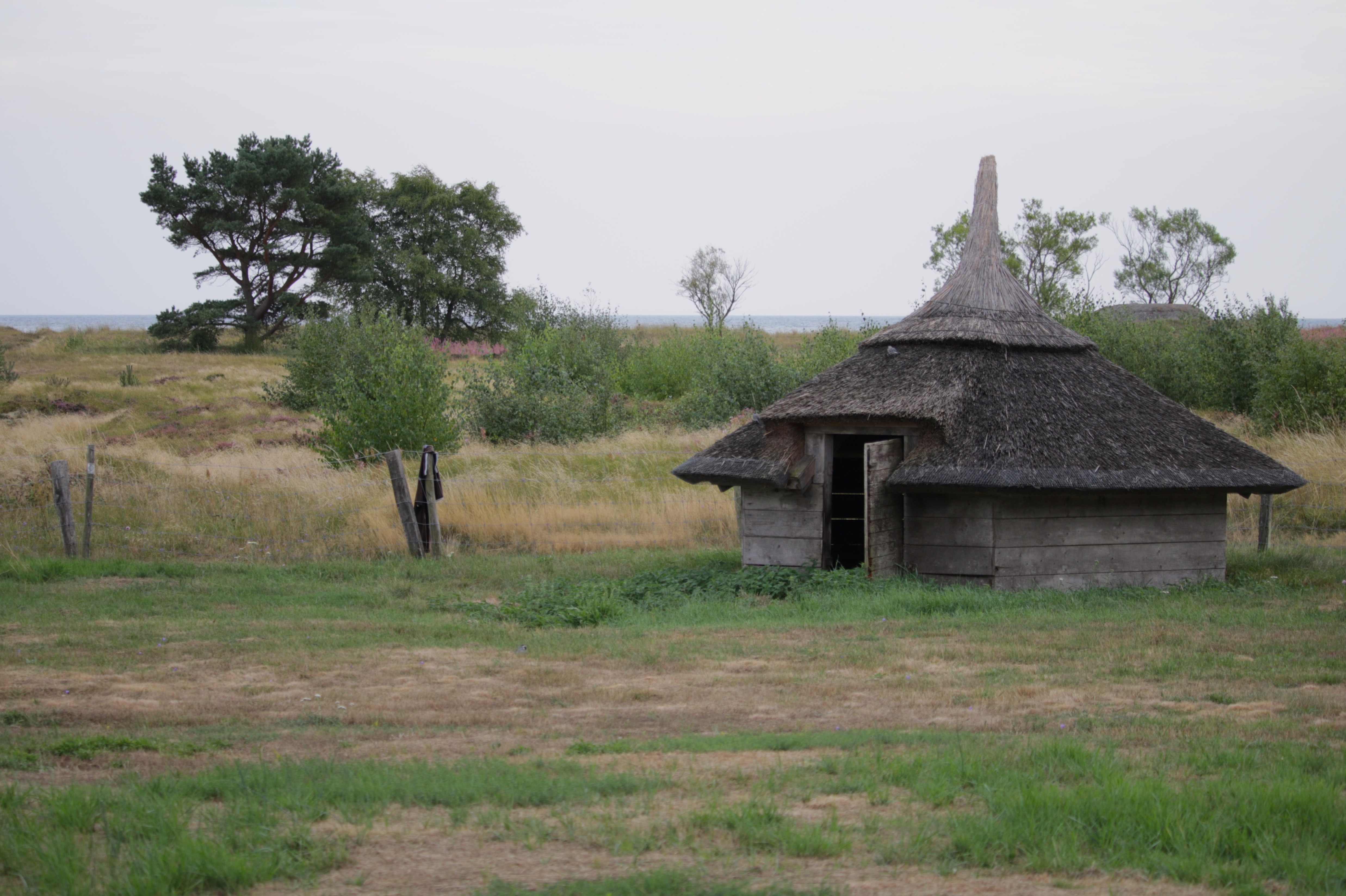 Fårabackarna Skateholm